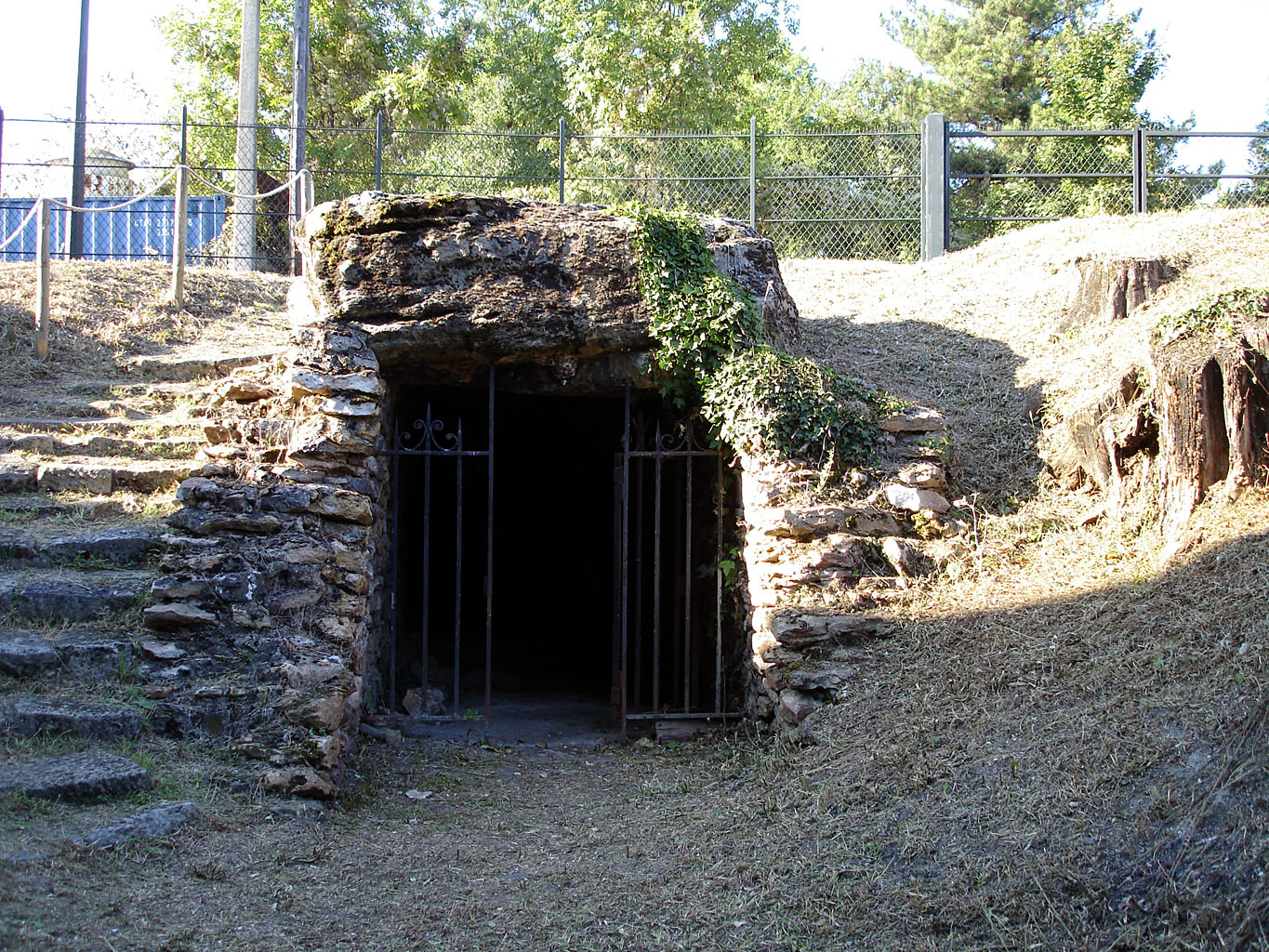 Allée couverte des Déserts, à Argenteuil (Val-d'Oise)